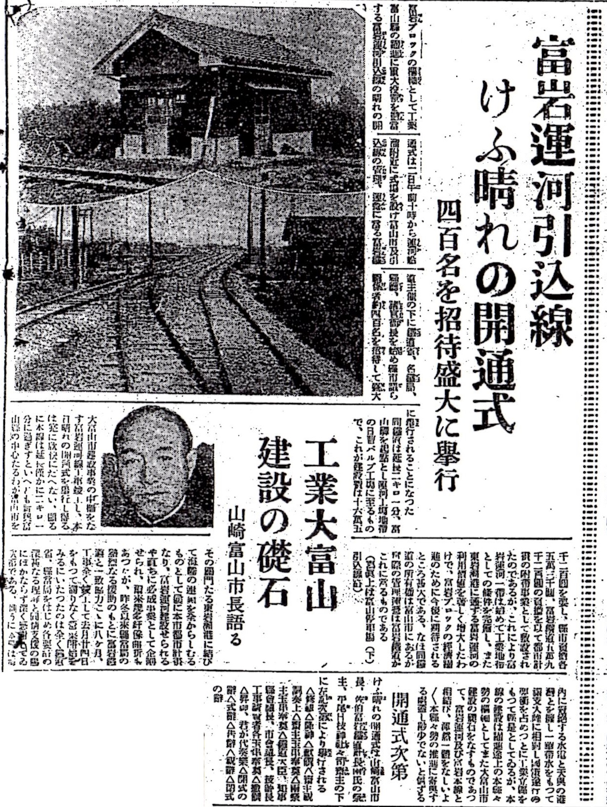 富岩運河引込線けふ晴れの開通式